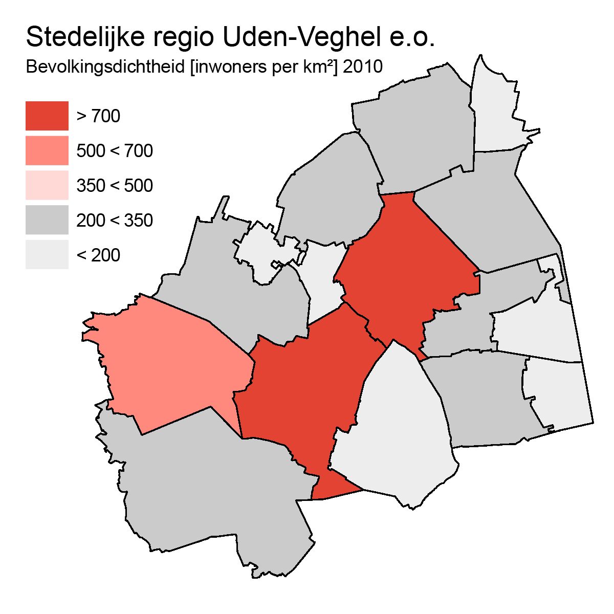 Bevolkingsdichtheid stedelijke regio Uden-Veghel per woonplaats (BAG).